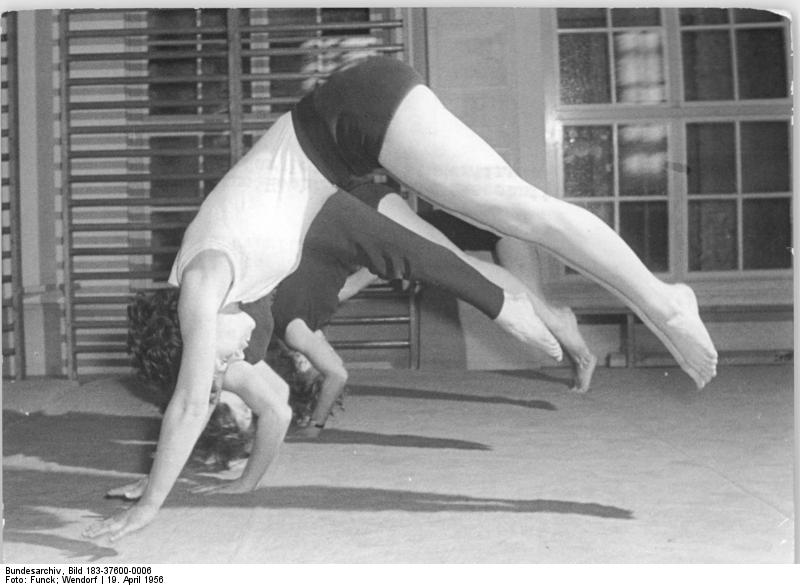 Leipzig, DHfK, Gymnastik Zentralbild Funck,Wendorf-Bay-Qu 19.4.1956 DHfK für das II. Deutsche Turn- und Sportfest. Auch die Deutsche Hochschule für Körperkultur (DHfK) in Leipzig wird in der zeit vom 2. bis 5. August 1956 wesentlich zum Gelingen des II. Deutschen Turn- und Sportfestes beitragen. Die jungen Studenten haben einige Übungen einstudiert, die sie vor den 100.000 in Leipzig zeigen werden. Über 700 Sportler der DHfK werden die Zuschauer mit ihren Reifenübungen, Gymnastikübungen usw. erfreuen. UBz: Eine Hechtrolle. Ein Ausschnitt aus den Gymnastikübungen der Leipziger Studentinnen.